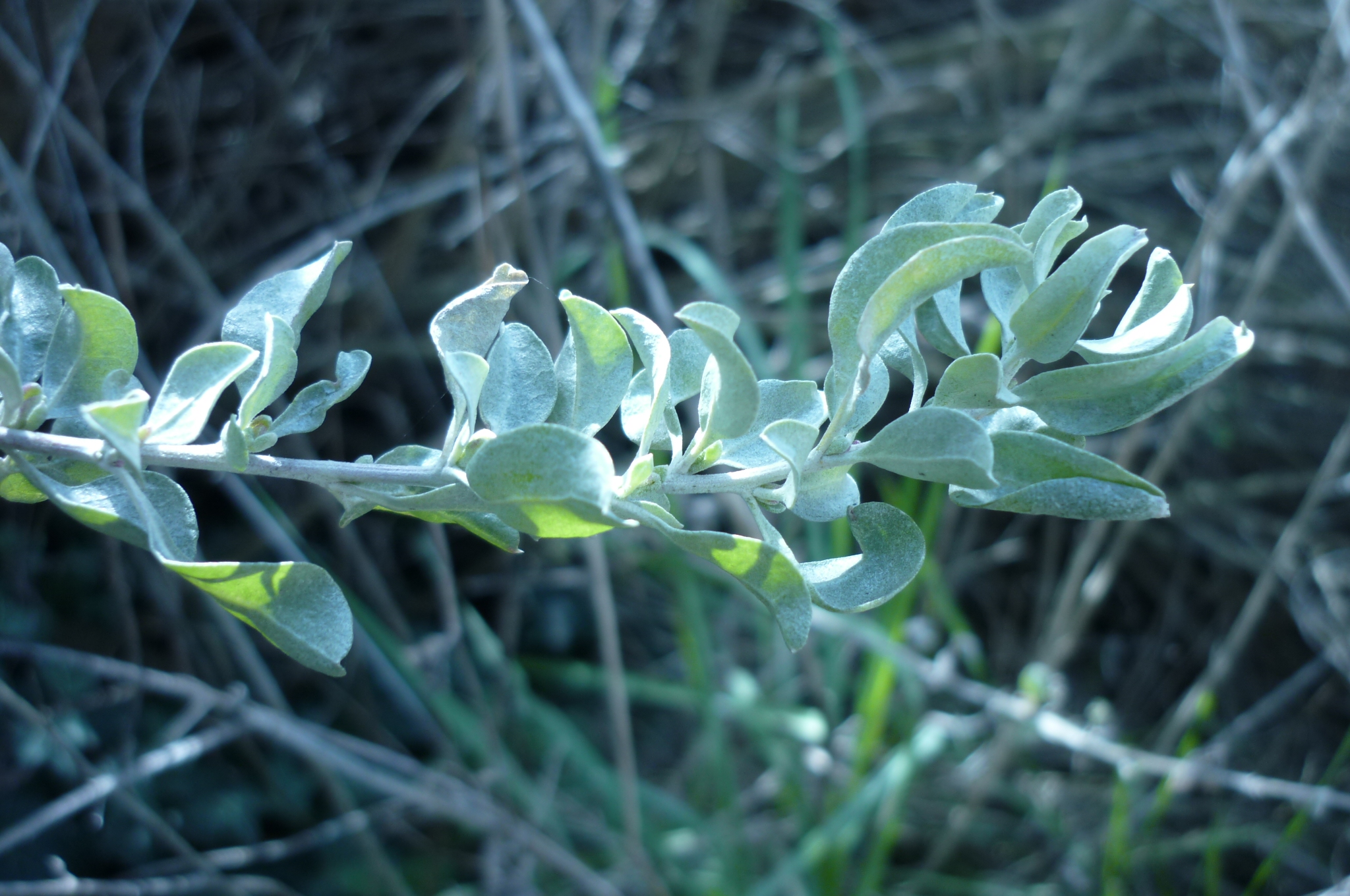 Se puede observar un brote de Atriplex halimus.